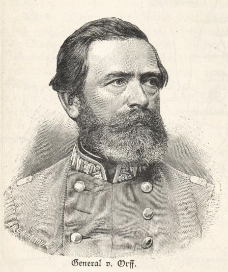 Karl von Orff (auch Orff auf Frohburg), Bayerischer General (1817-1895)